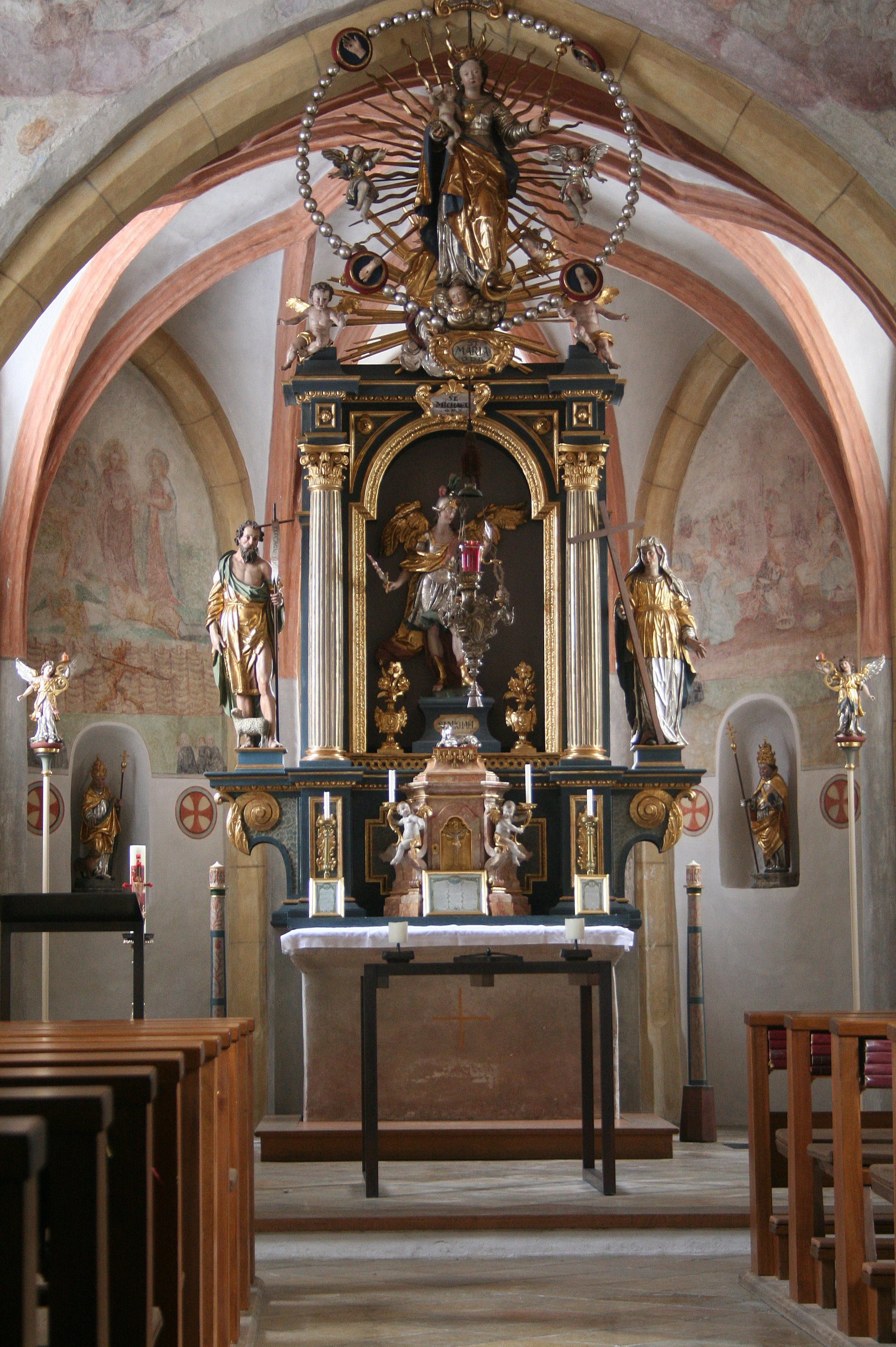 St. Michael Buchendorf Innen